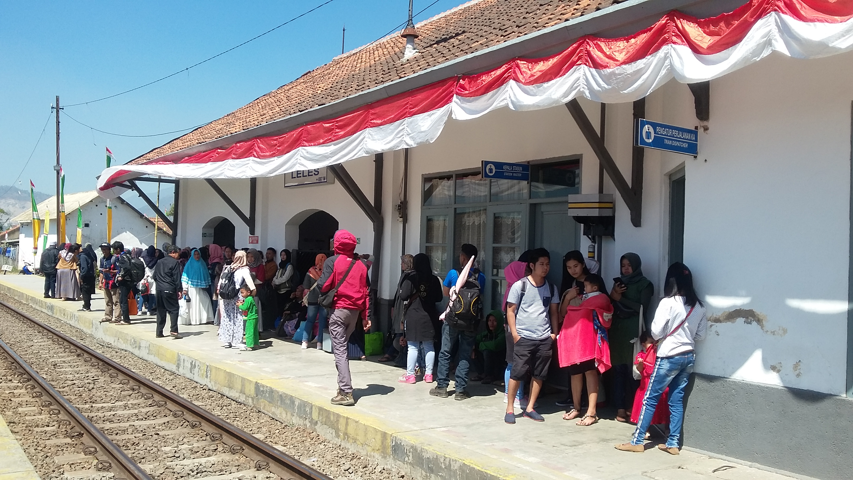 Bangunan dan emplasemen stasiun Leles